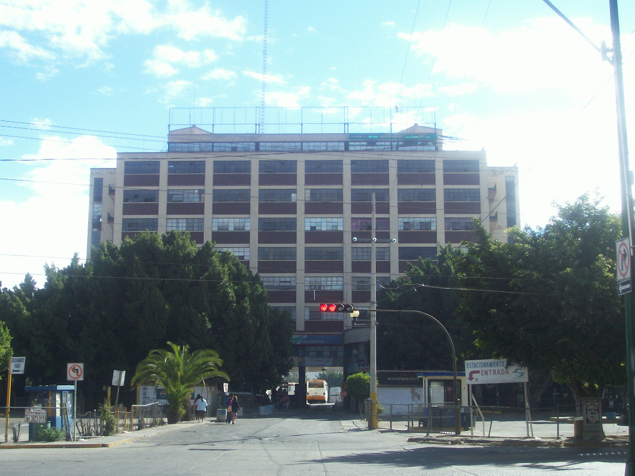 Antigua Central de Autobuses de Guadalajara, Jalisco México